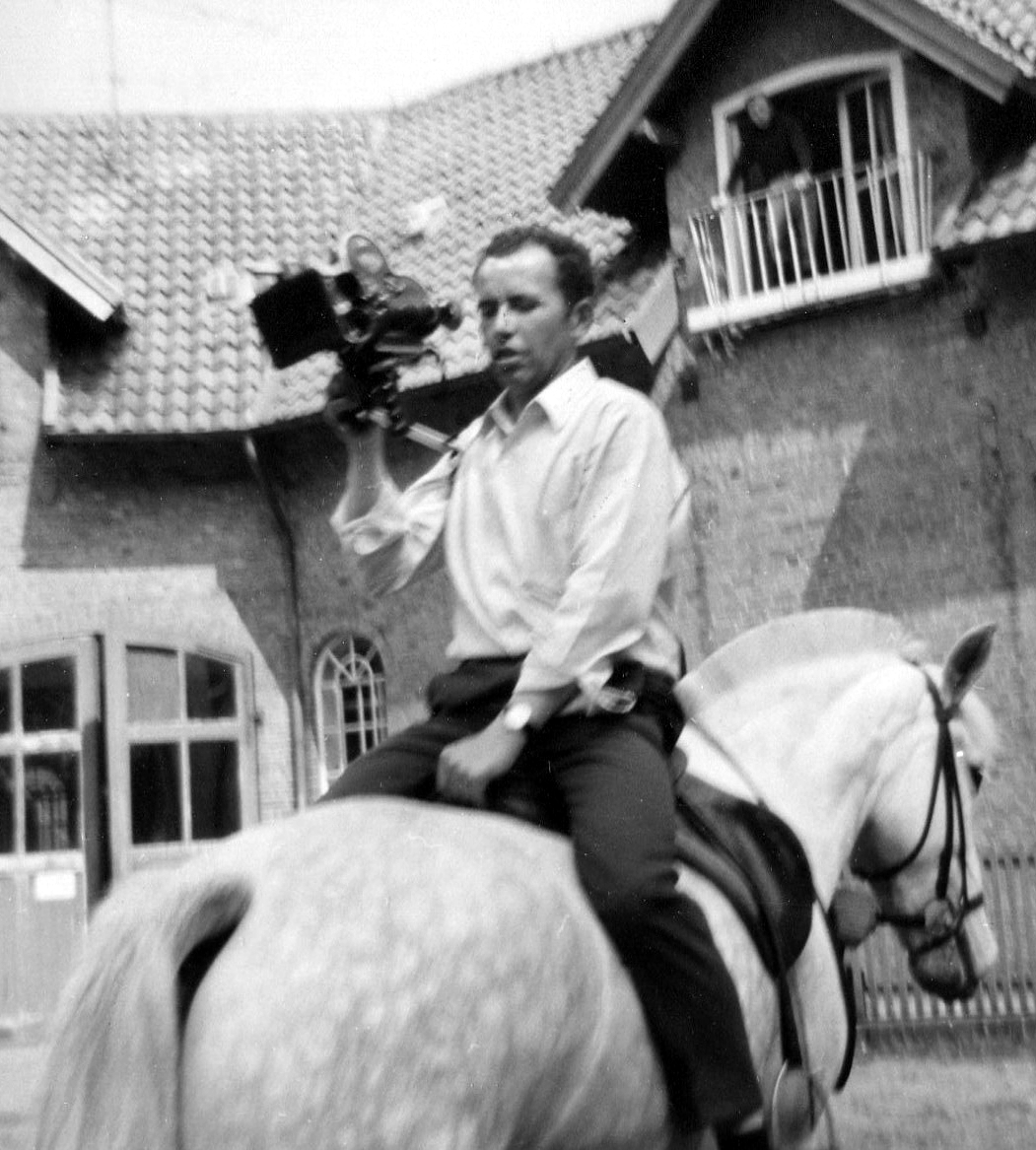 Kameramann Hans-Joachim Theuerkauf bei Dreharbeiten für den NDR-Semi-Dokumentarfilm Hanseatischer Frühling